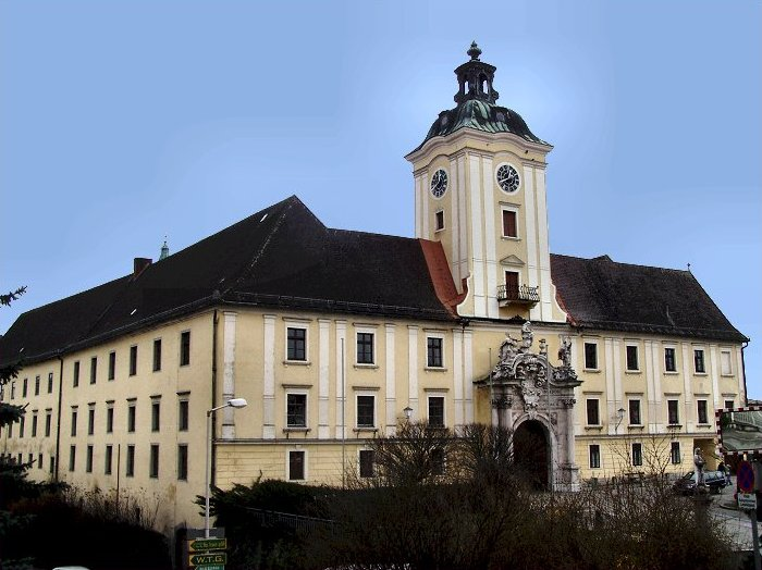 Stift Lambach - Eingangsportal (Westtrakt)